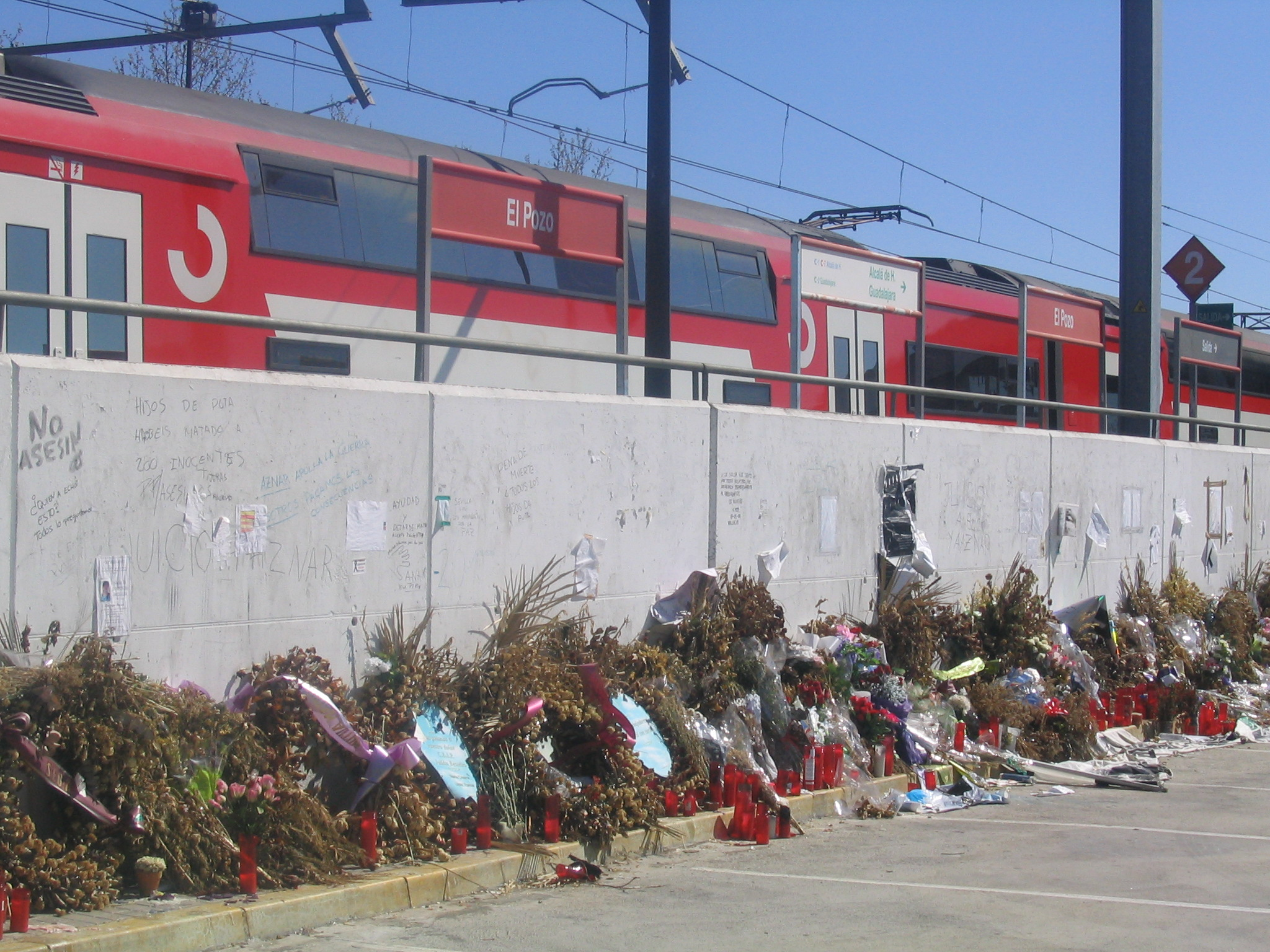 Estación El Pozo - 2004